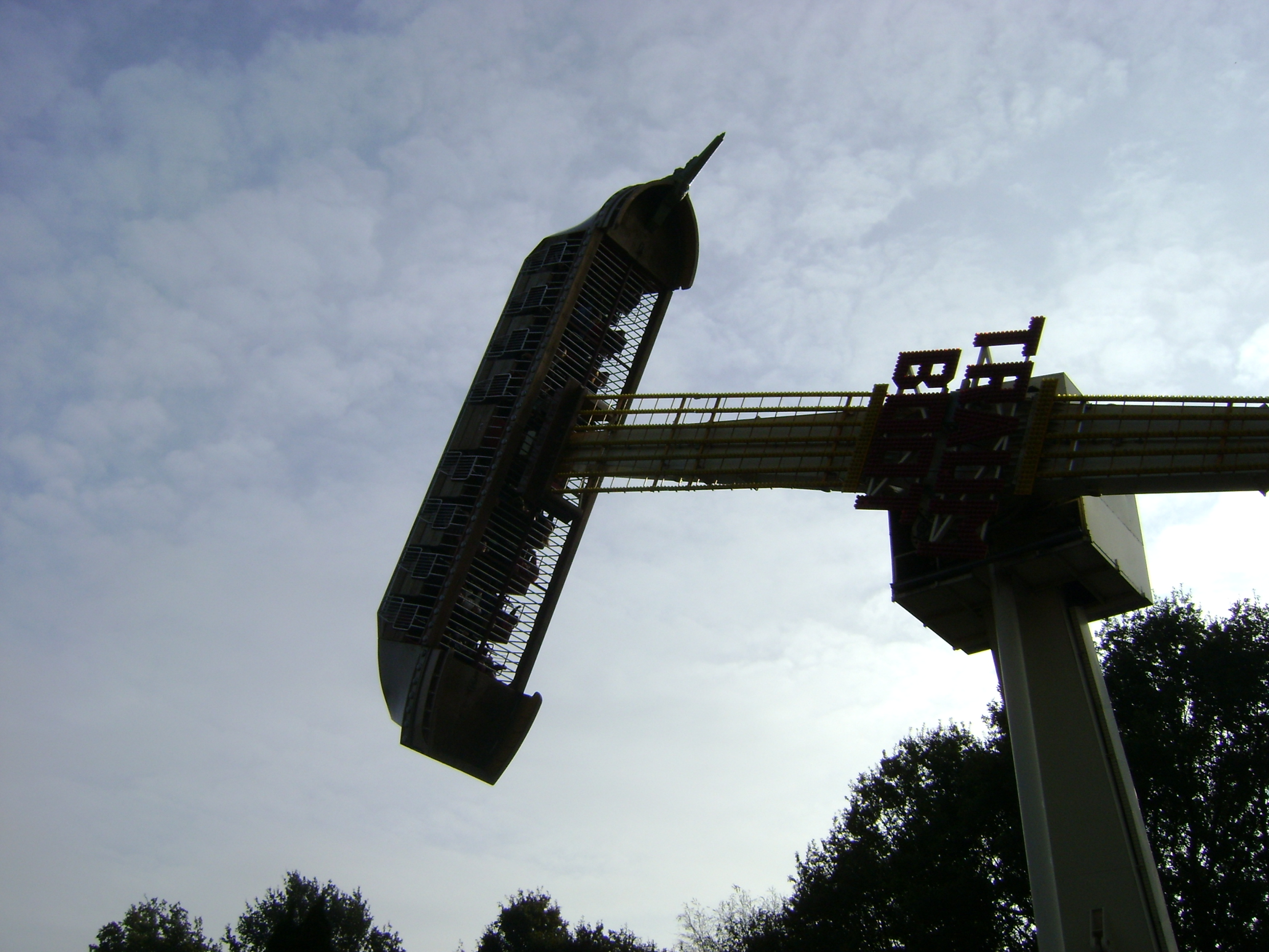 De kamikaze Droomboot in Attractiepark Slagharen, 2008.